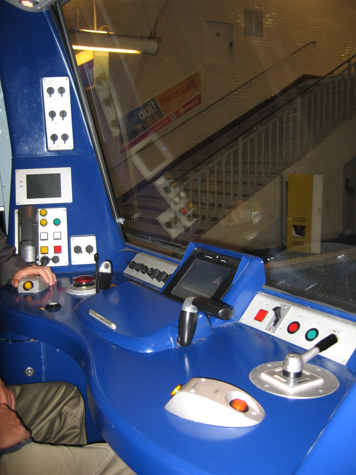 Journées du patrimoine RATP 16-17/09/2006. Cabine de conduite du MF 2000.